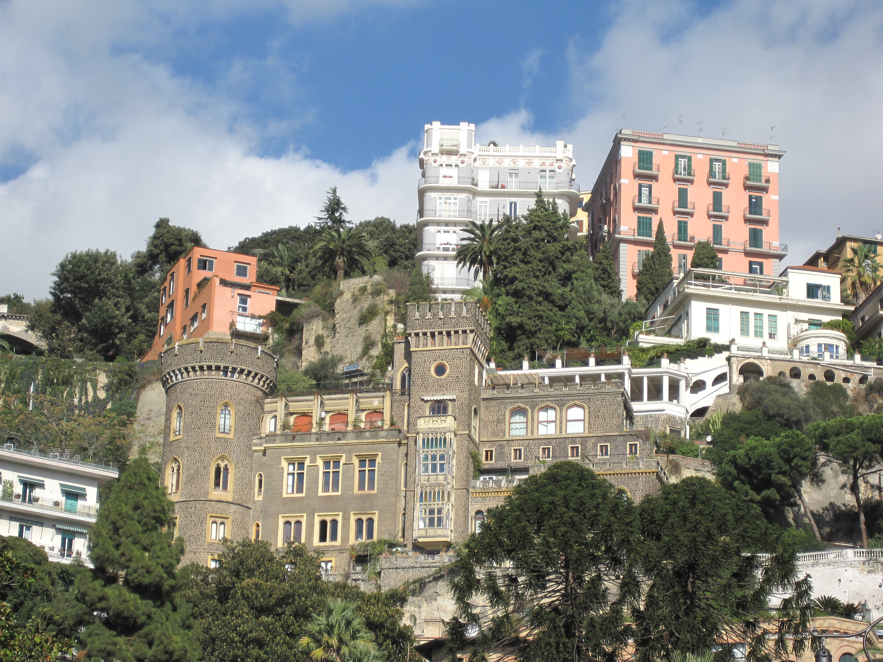 Young Lamont (1851-1929) - Castello Aselmeyer (Corso Vittorio Emanuele 166, Napoli) Realizzato tra il 1902 e il 1904. Costruito e di proprietà del progettista fu venduto nel 1904 al banchiere Aselmeyer.